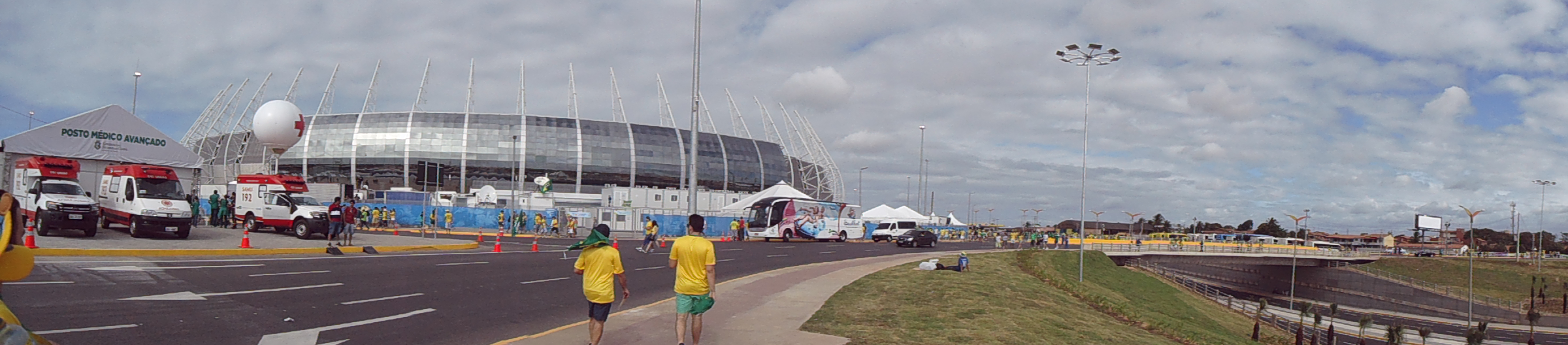 Brasil x México